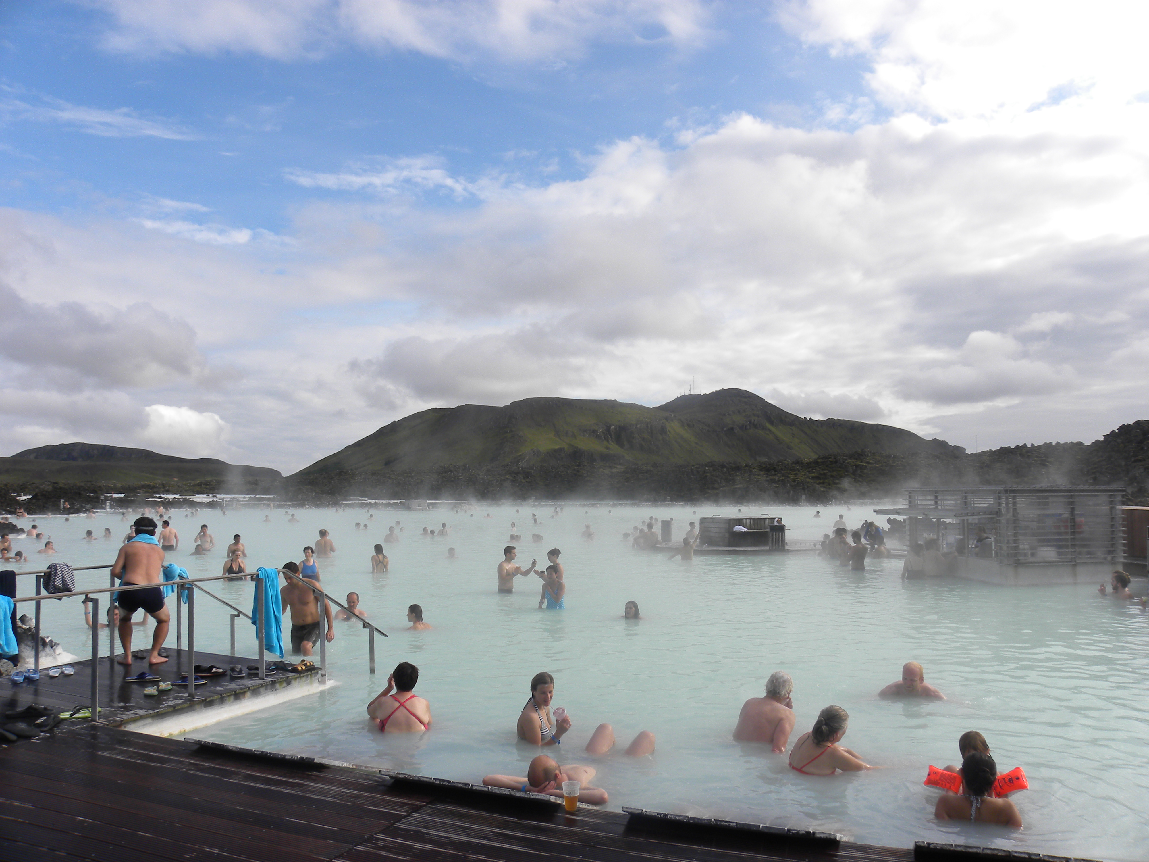 Blue Lagoon